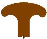 hruška (hlavička) pádla, tvarovaná, vlastní obrázek